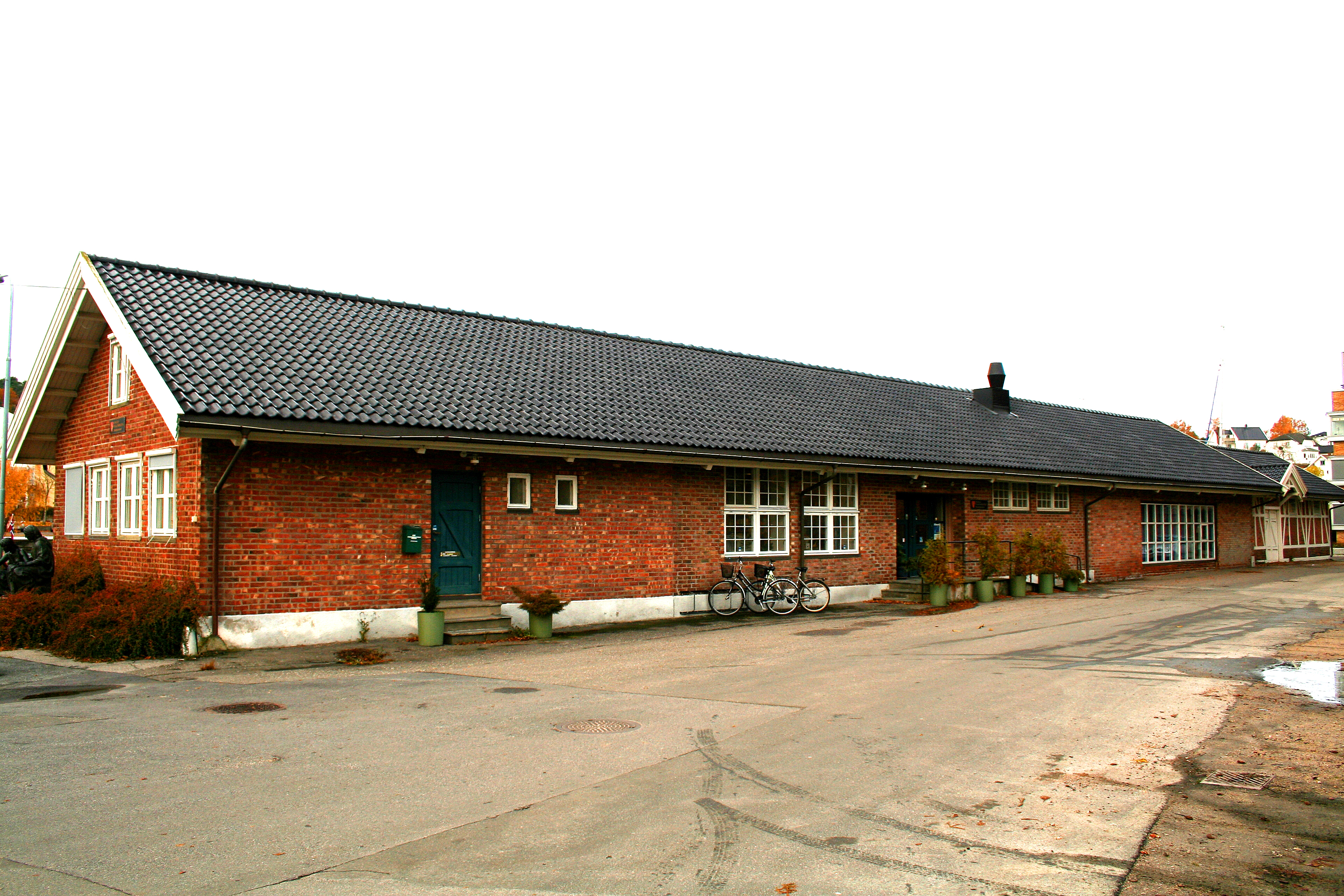 Bilde av Østfold fylkesbibliotek fra siden.